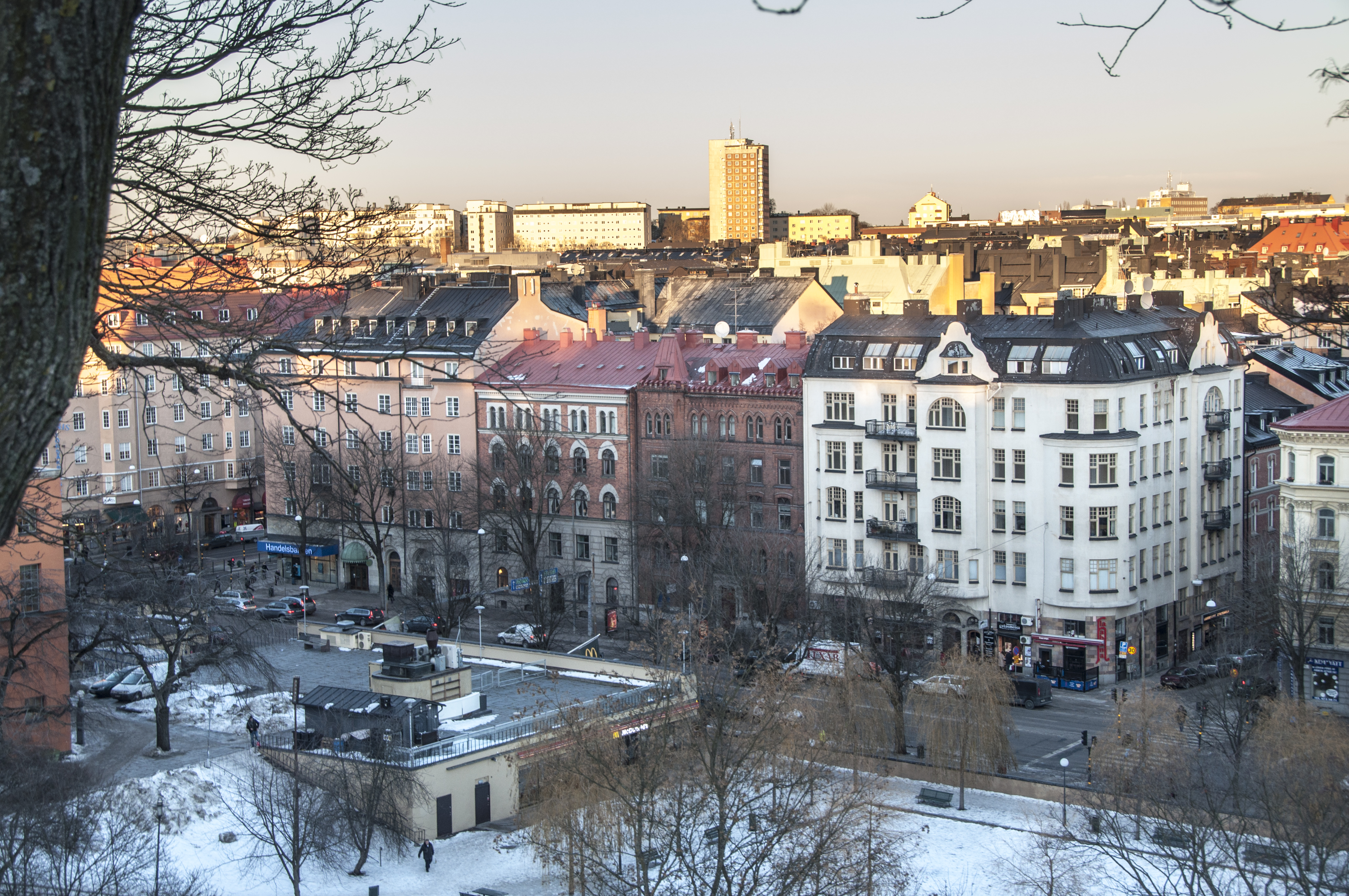 Kvarteret Apelträdet mot Sveavägen 108-114